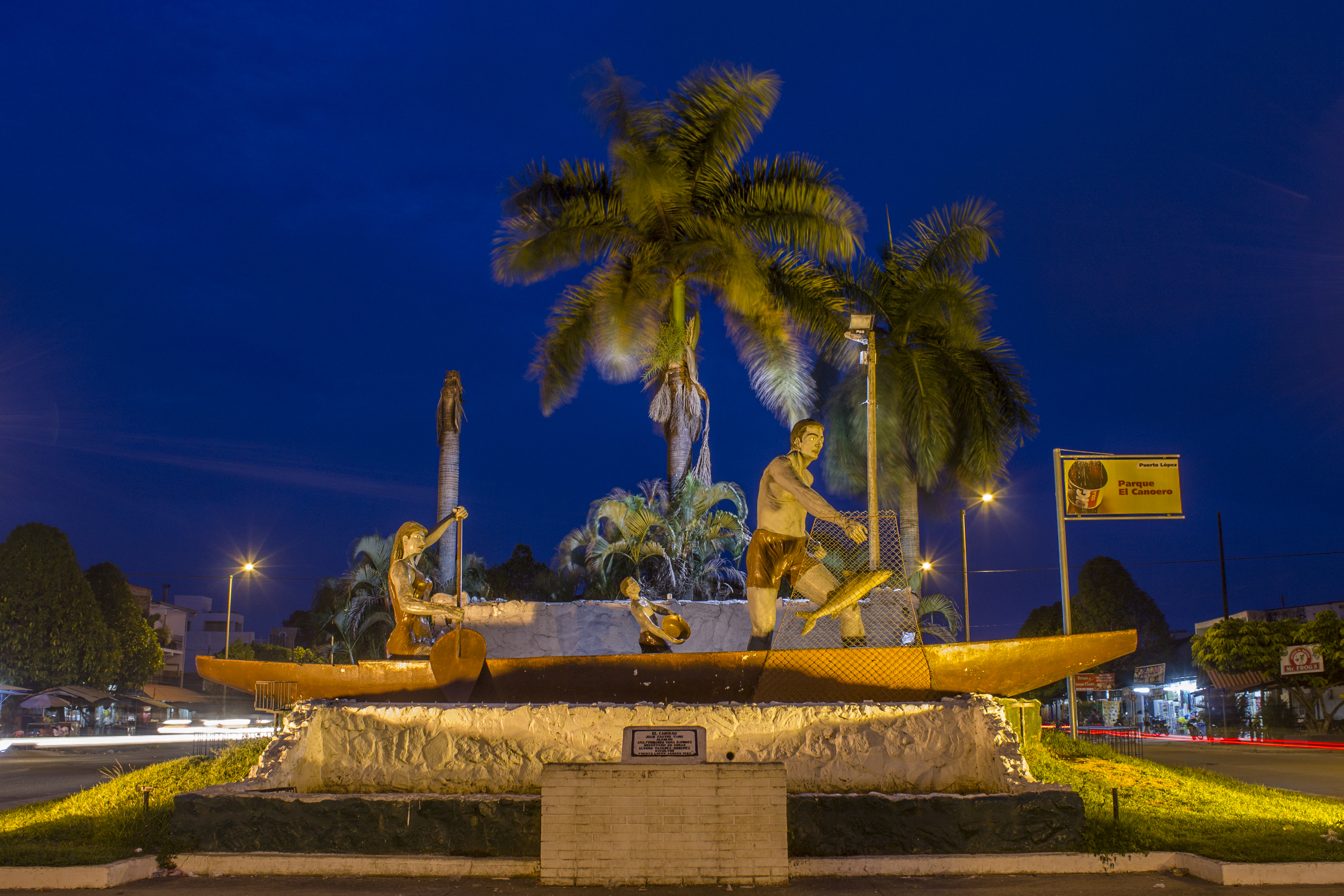 Parque el canoero año 2016